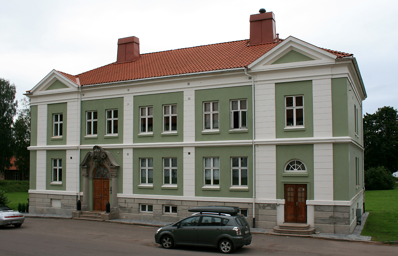 Adminstrasjonsbygning og overlegebolig, Karljohansvern, Horten.